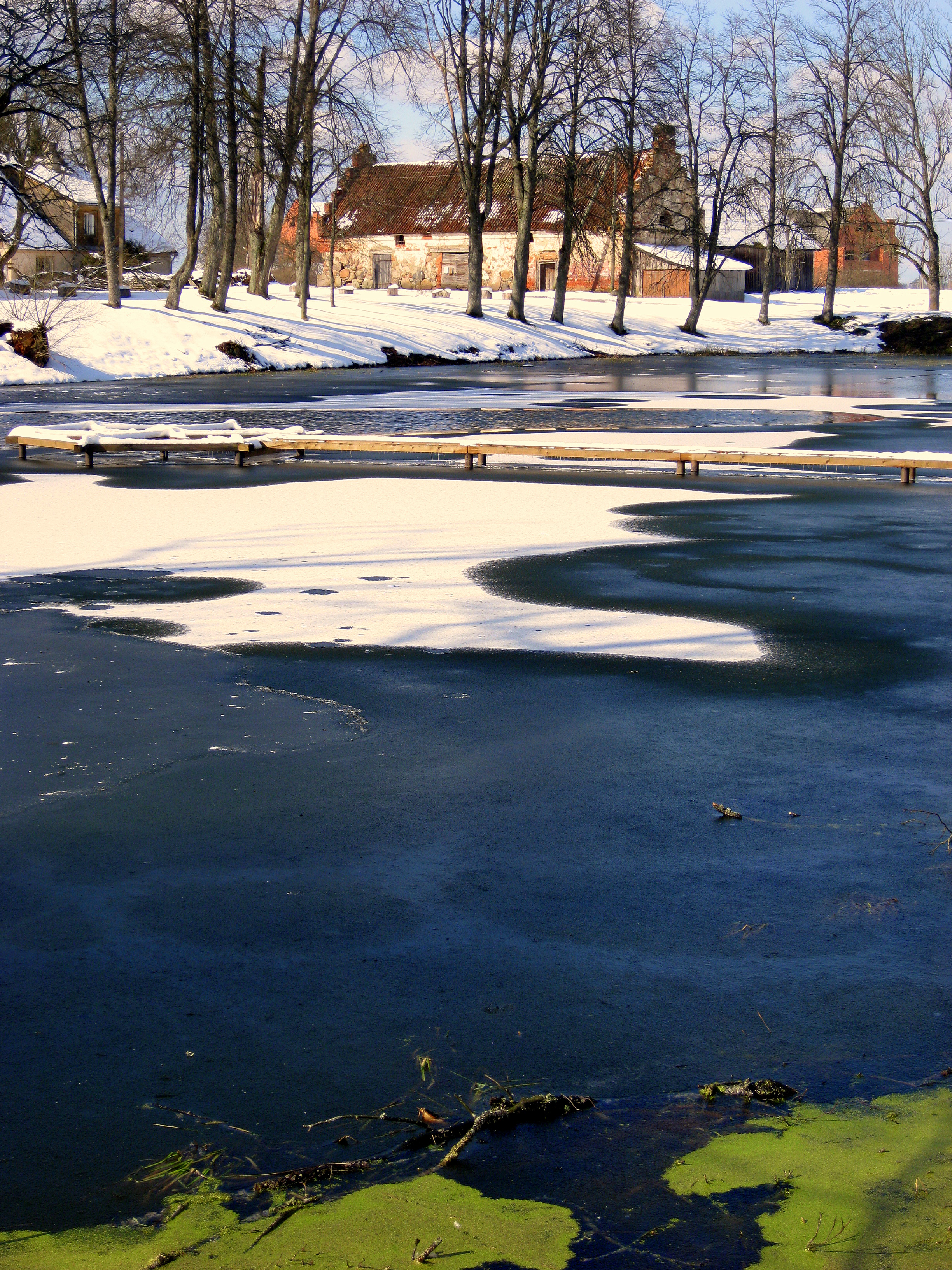 Apriki Manor's pond